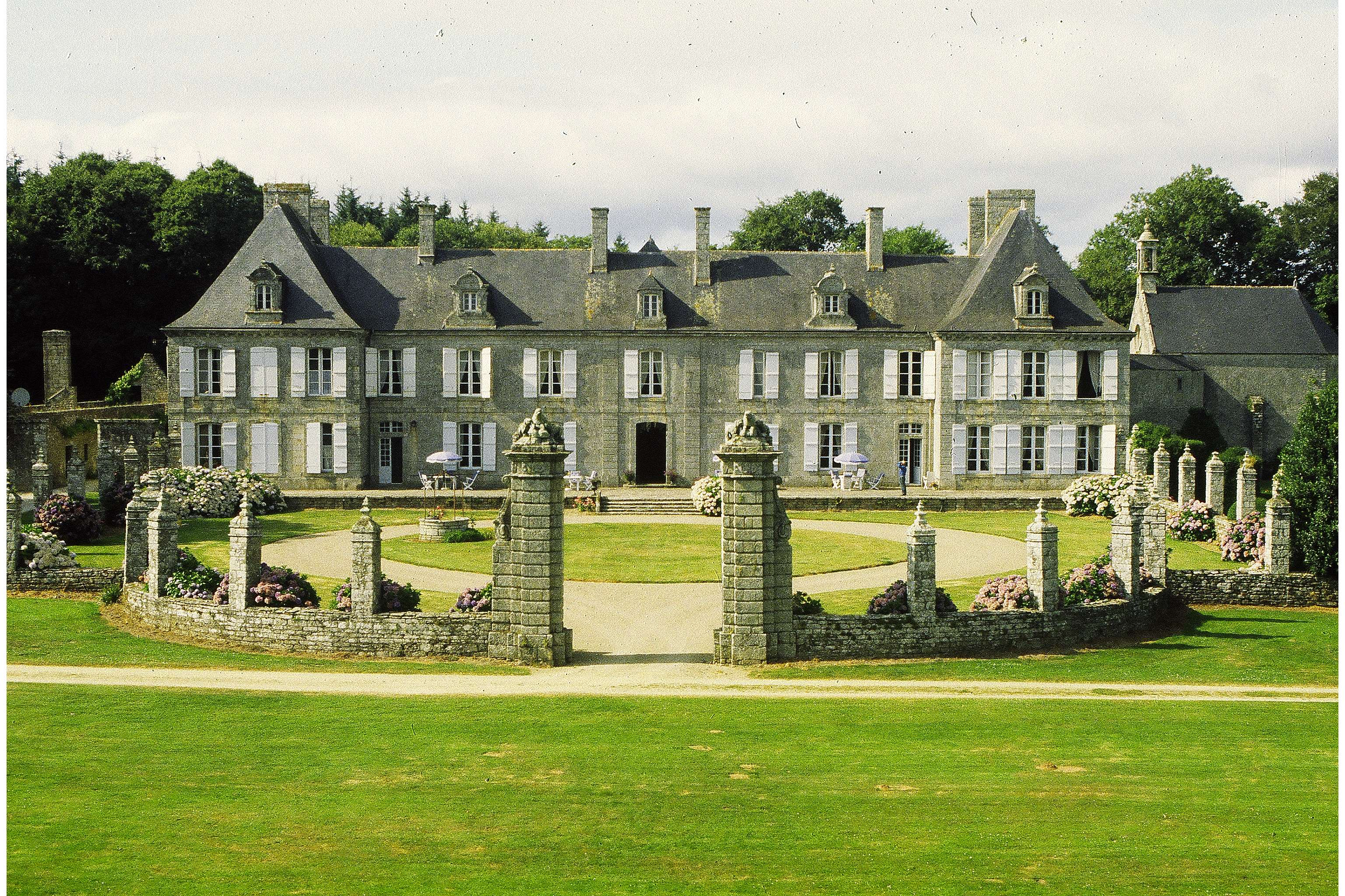 Façade Sud